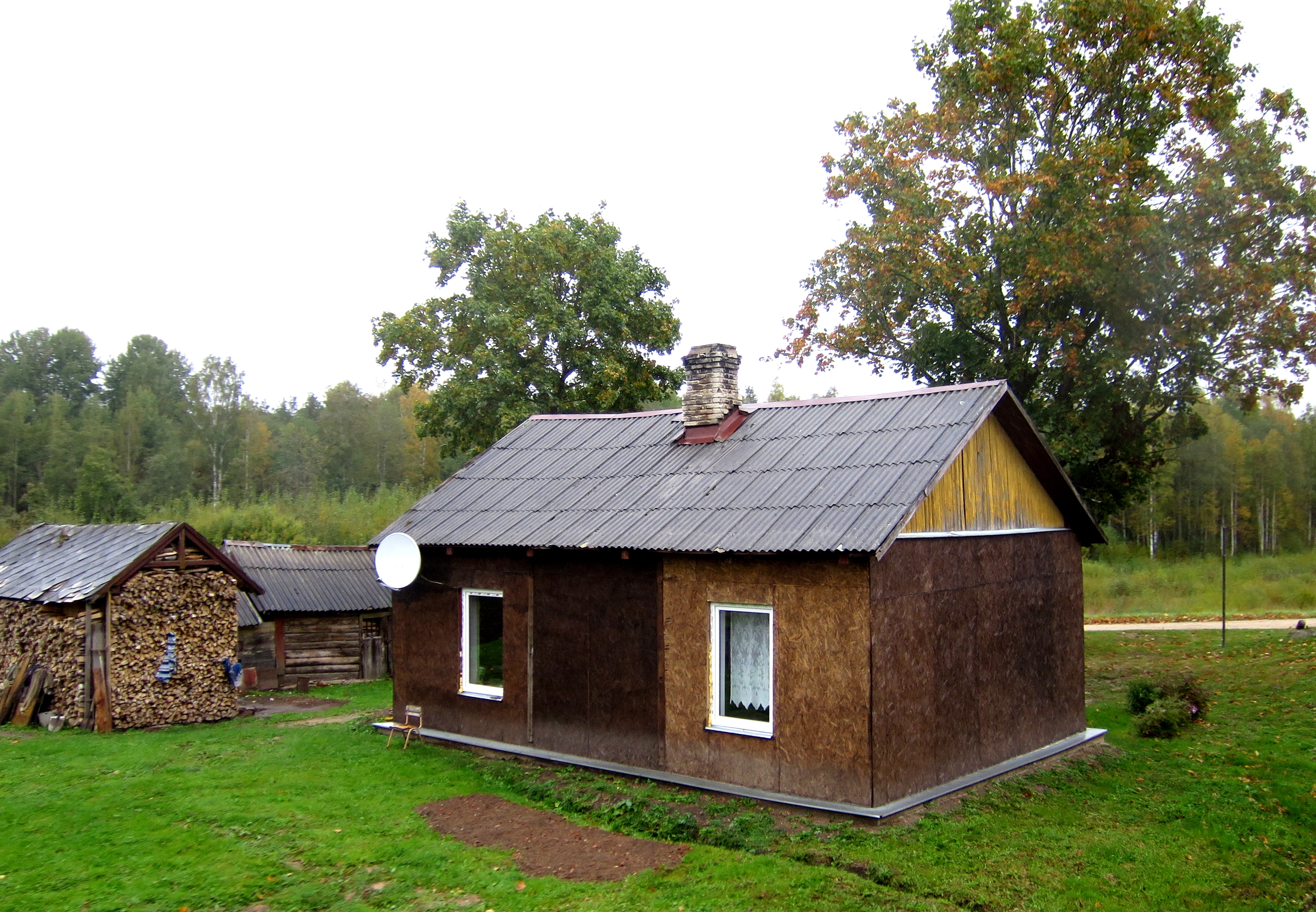 Bijusī Vainavas stacijas ēka